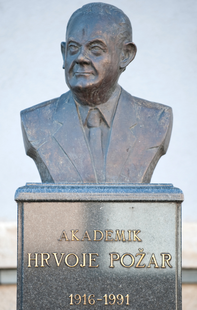 16. obljetnica vojnoredarstvene operacije Oluja